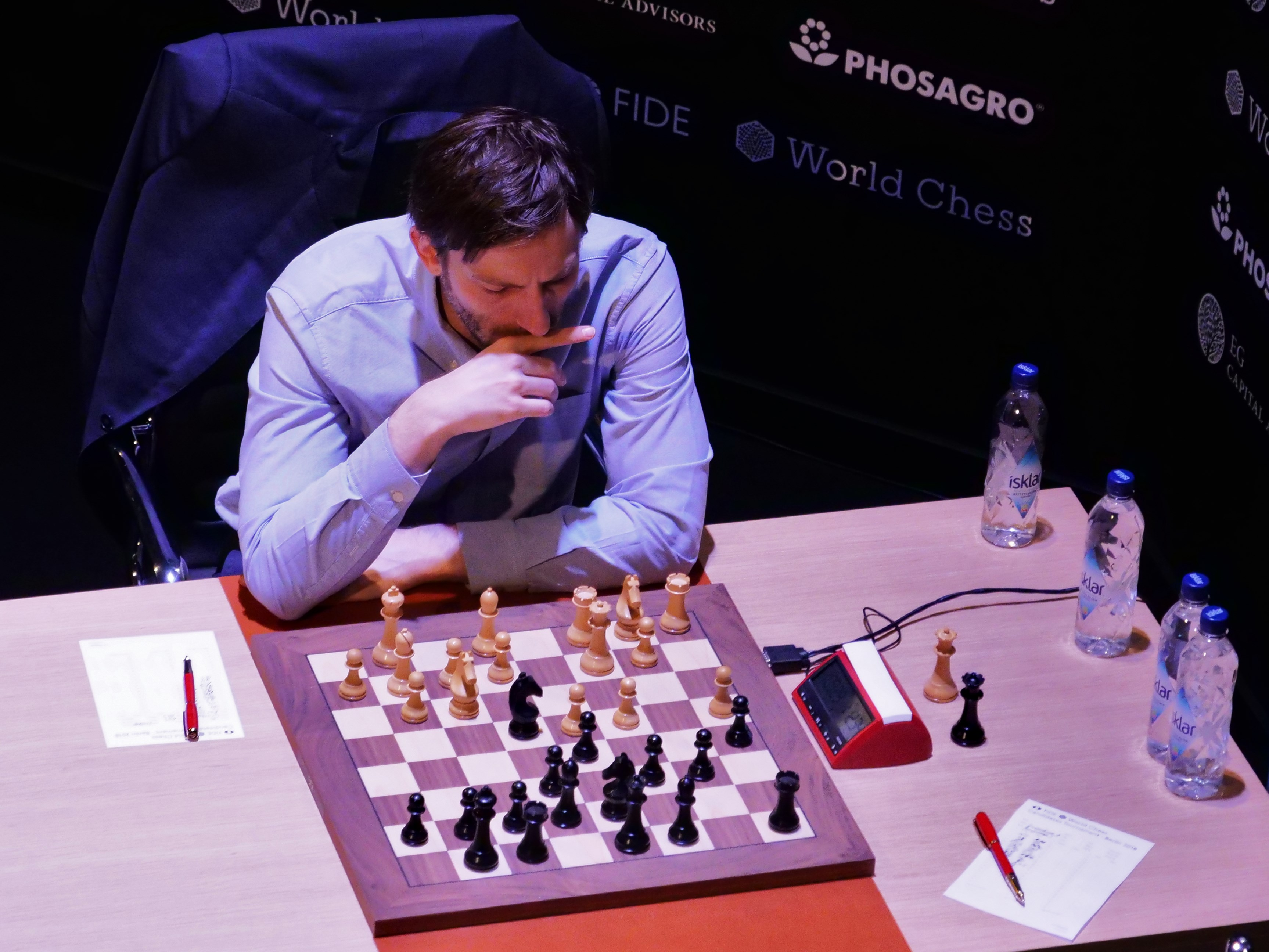 Grischtschuk-Karjakin-Kandidatenturnier Berlin 2018 Runde 10